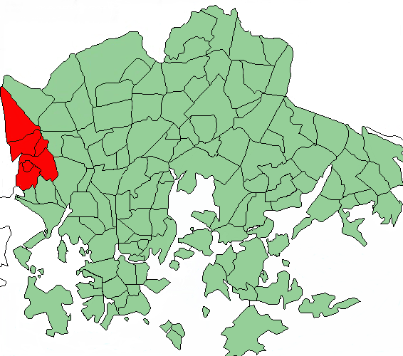 Districts of Helsinki, Pitäjänmäki area highlighted.